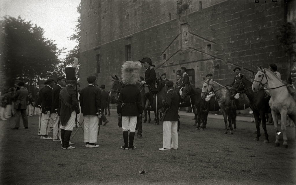 Título original: Celebración del alarde de Hondarribia con motivo de la celebración de sus fiestas patronales (11/12) Localización: Fuenterrabía (Guipúzcoa)